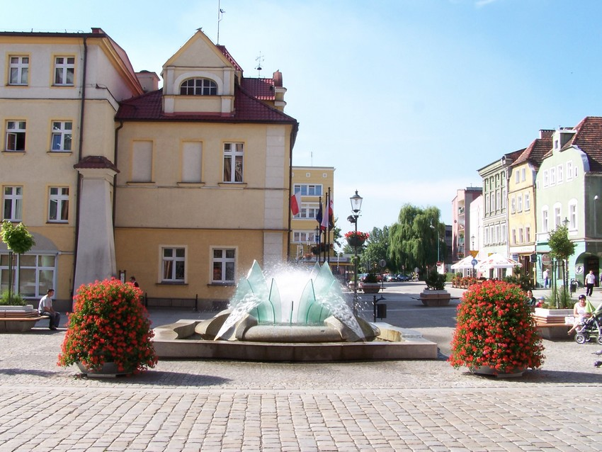 Fontanna, wieże kwiatowe w Żarach